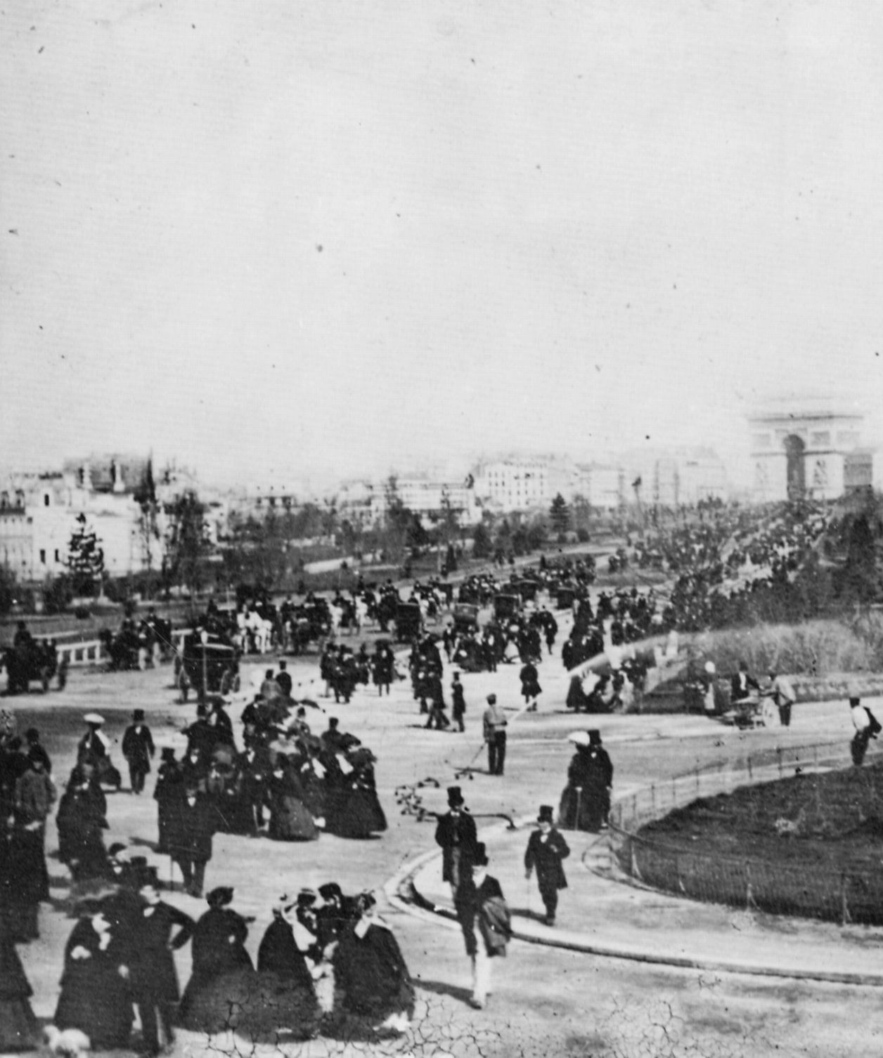 Französischer Photograph um 1860: Avenue de l'Impératrice, Paris